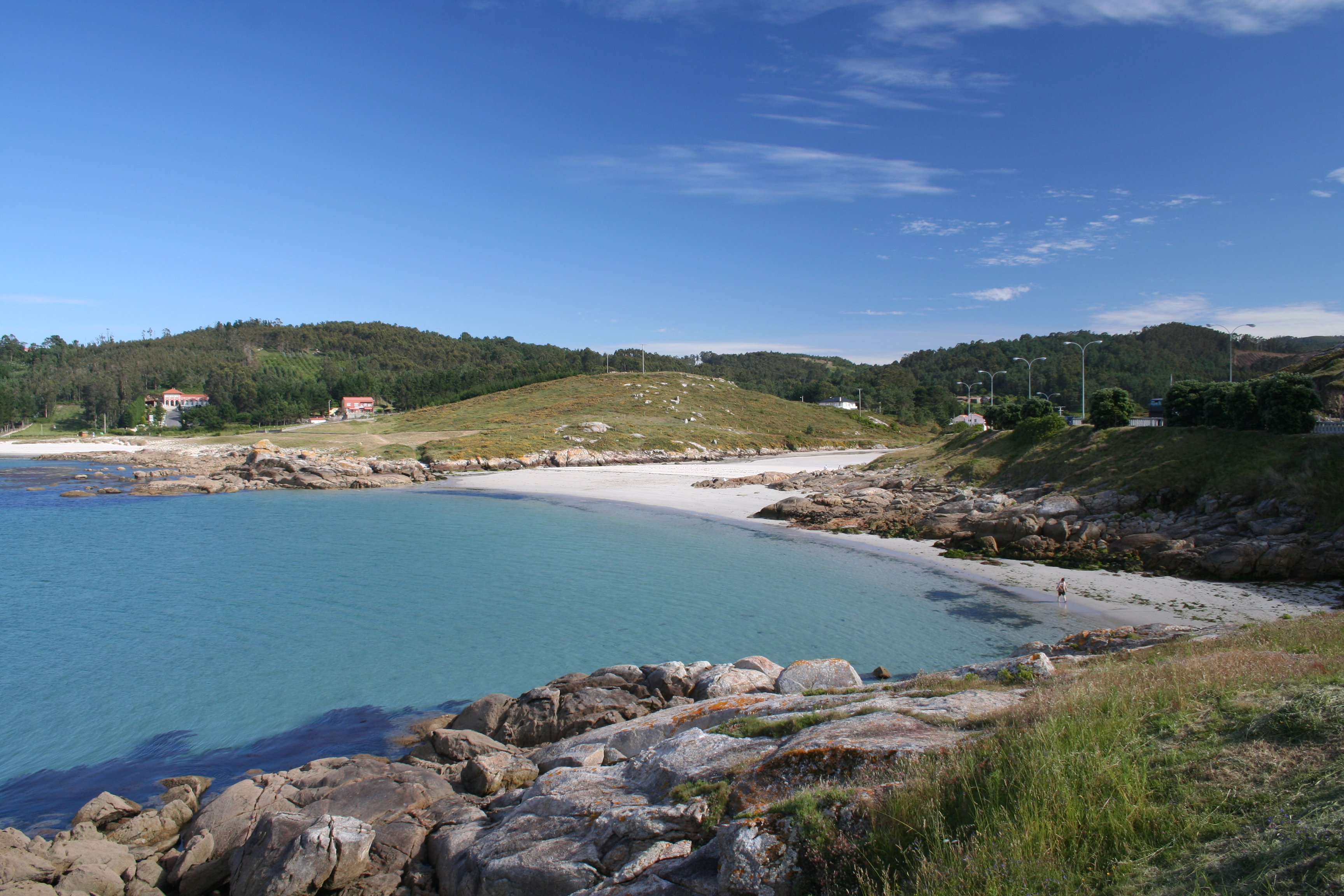 Praia de Muxía, Galiza